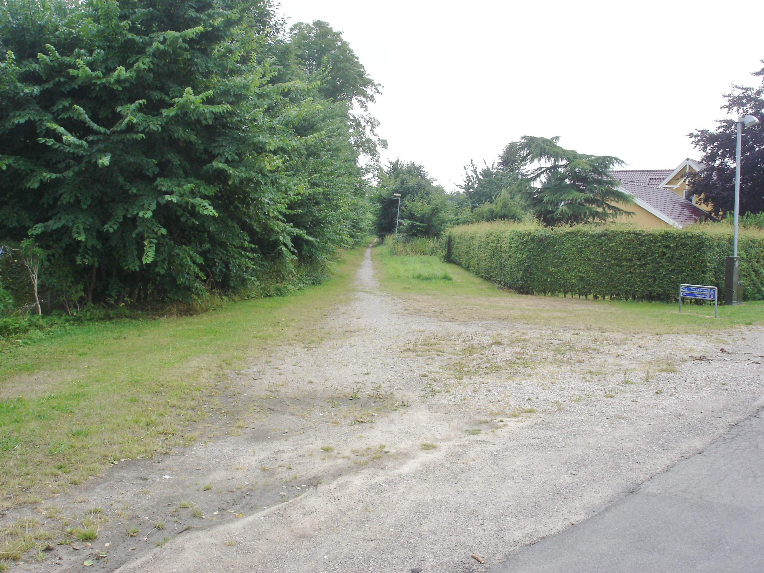 Fra Gl Landevej i Toreby starter en sti på Nystedbanens tracé